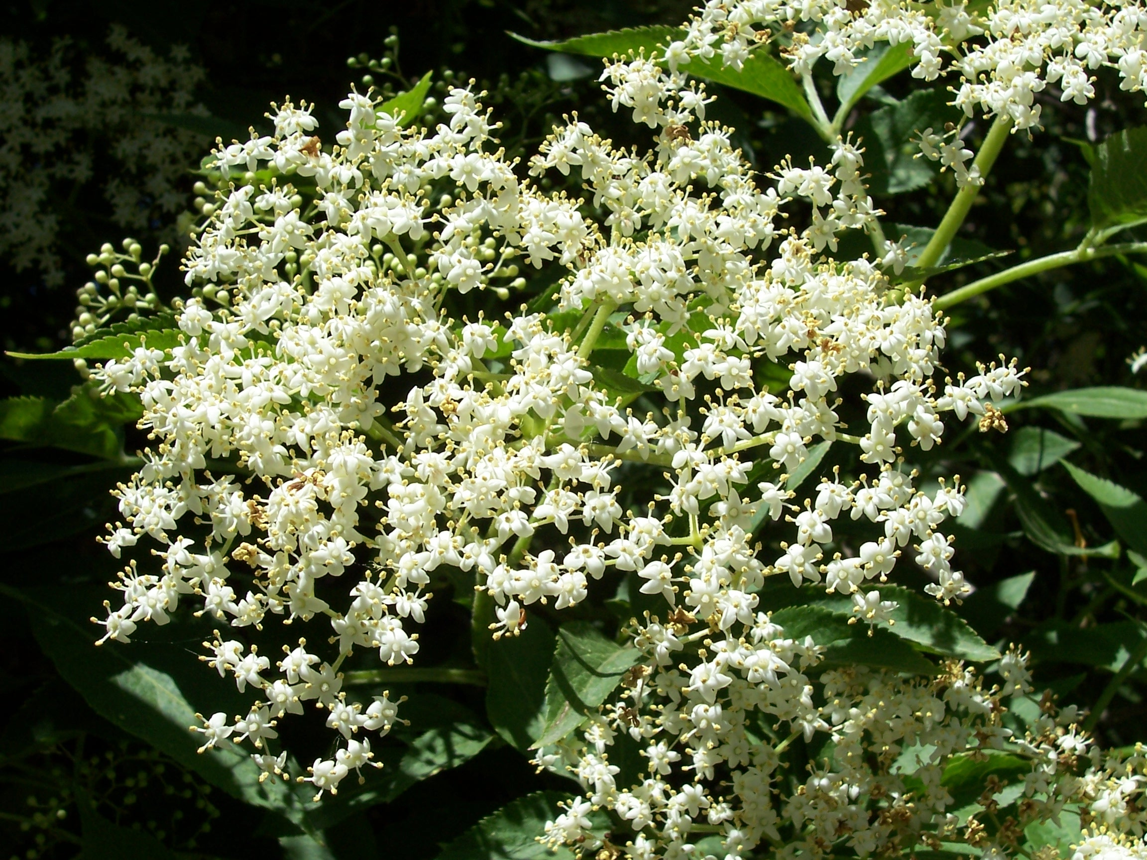 Blüten des Schwarzer Holunders (Sambucus nigra) am Weinpfad bei Cölbe, Hessen, Deutschland